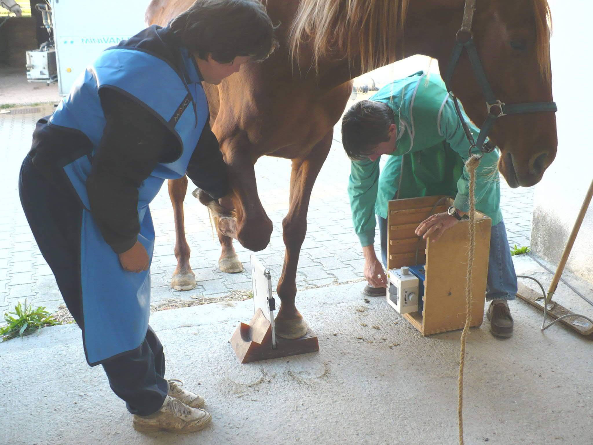 radiographie d'un antérieur de cheval (de profil)